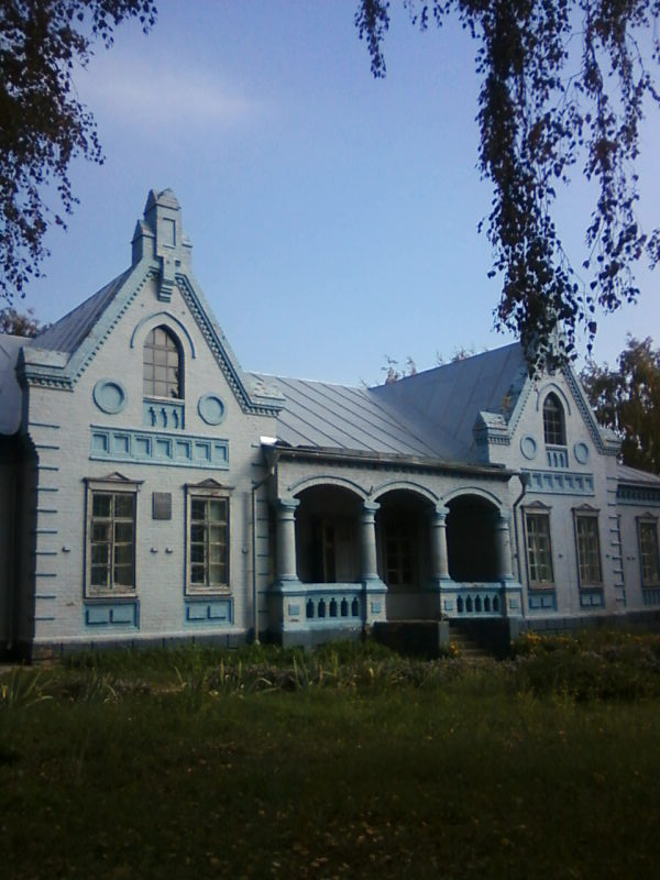 Дом Бергманов